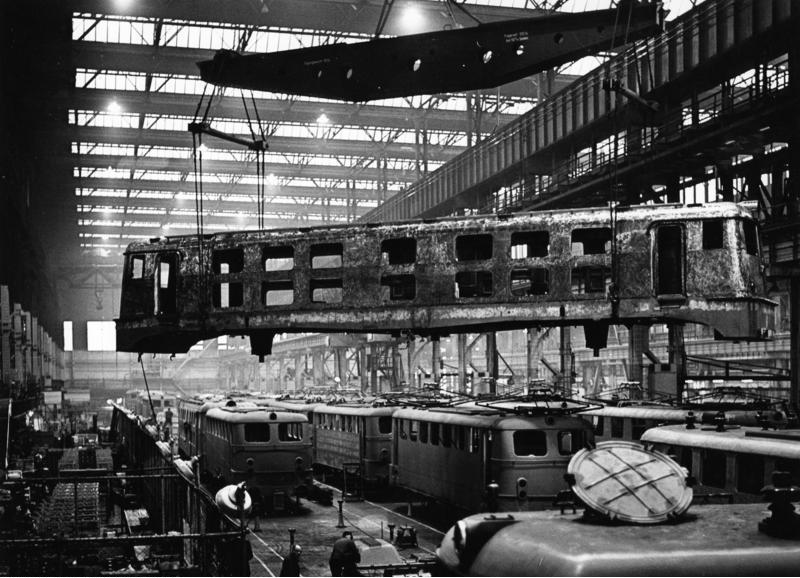 Essen Firma Friedr. Krupp Halle für Lokomotivbau